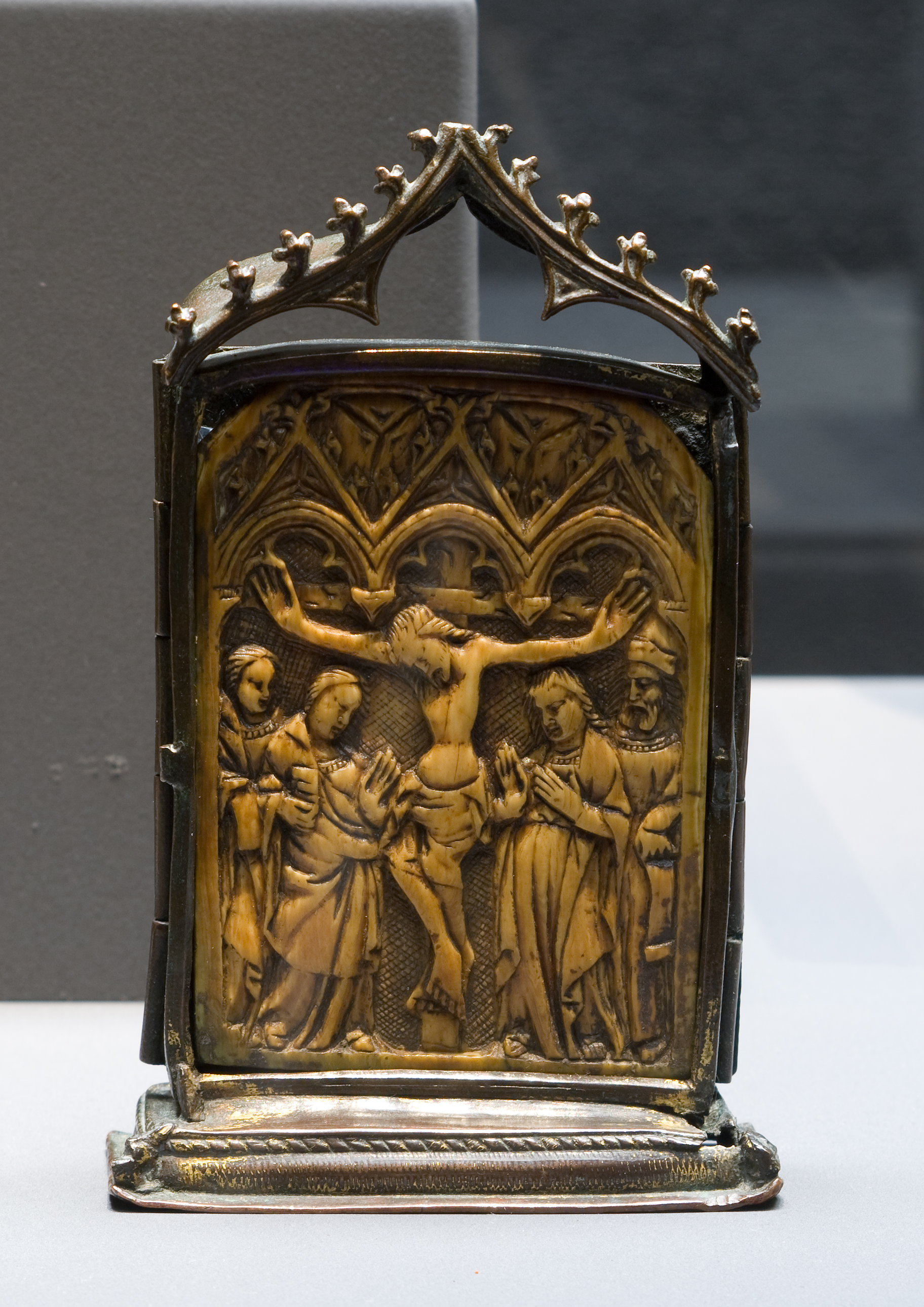 Paxtafel met kruisiging, Frankrijk of Duitsland, 15e eeuw. Tijdens de mis gaf men elkaar de vredeskus door de paxtafel te kussen en aan elkaar door te geven.